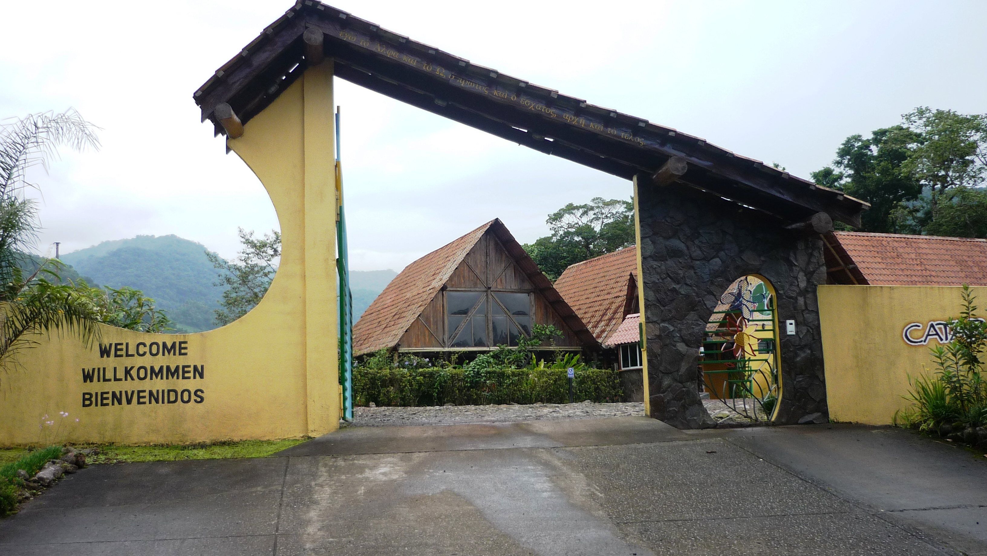 La Catarata del Toro se ubica en el distrito de Toro Amarillo, tiene unas vistas espectaculares y cuenta con miradores y hotel diseñado por el afamado arquitecto Ibo Bonilla